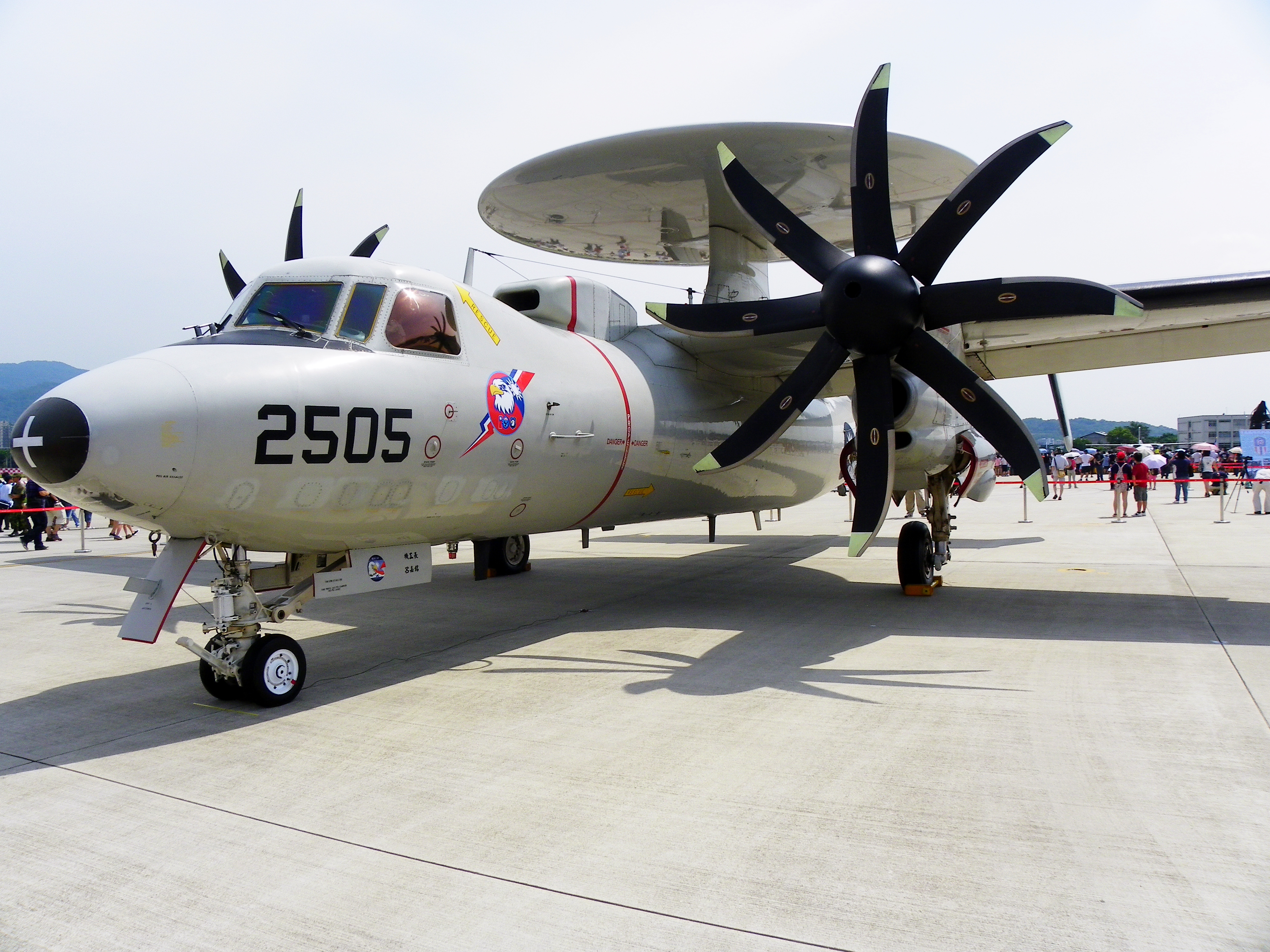 2011年8月13日空軍松山基地營區開放活動中，展示之E-2K 2505早期預警機。